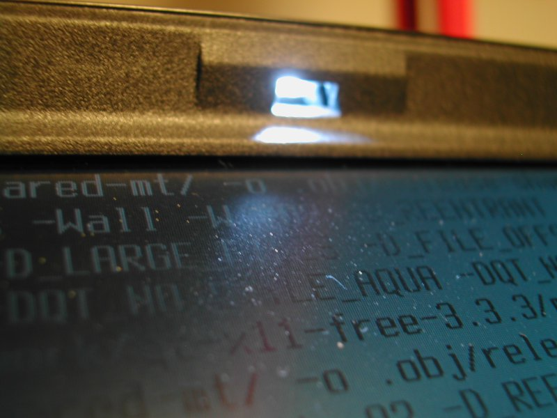 Beschreibung: ThinkLight an einem T23 Quelle: selbst fotografiert Lizenz